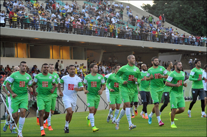 The Desert Warriors are ready for action in Brazil. محاربو الصحراء جاهزون للعمل في البرازيل. Les Guerriers du désert sont prêts à passer à l'action au Brésil.